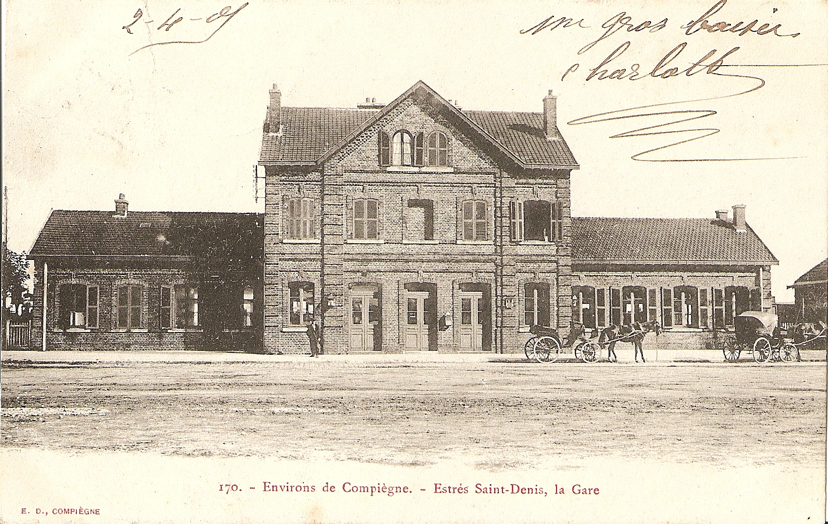 Carte postale ancienne éditée par ED N°170Environs de Compiègne : Estrées-Saint-Denis (Oise - Picardie - France) : La Gare d'Estrées-Saint-Denis